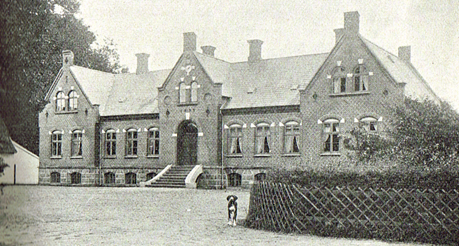 Nislevgård nævnes første gang i 1588 og var en avlsgård under Ravnholt Gods fra 1752 til 1925. Gården ligger i Otterup Sogn, Lunde Herred (Odense Amt), Otterup Kommune . Hovedbygningen er opført i 1895. Nislevgård er idag efterskole.